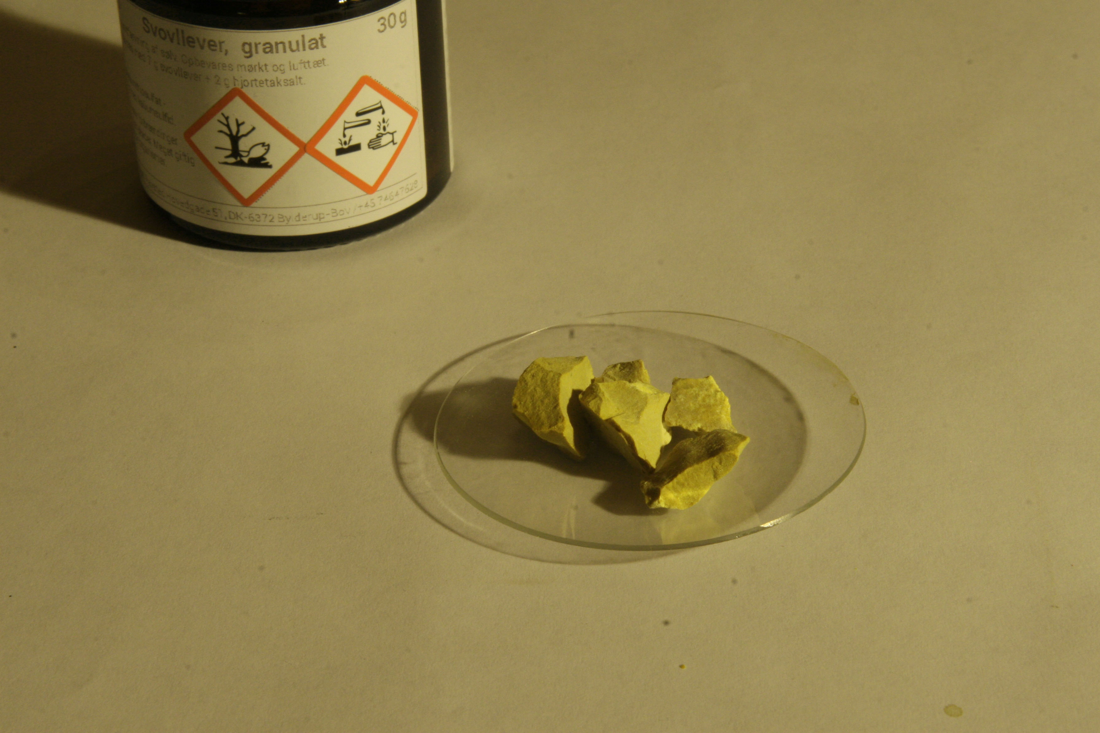 Klumper af svovllever